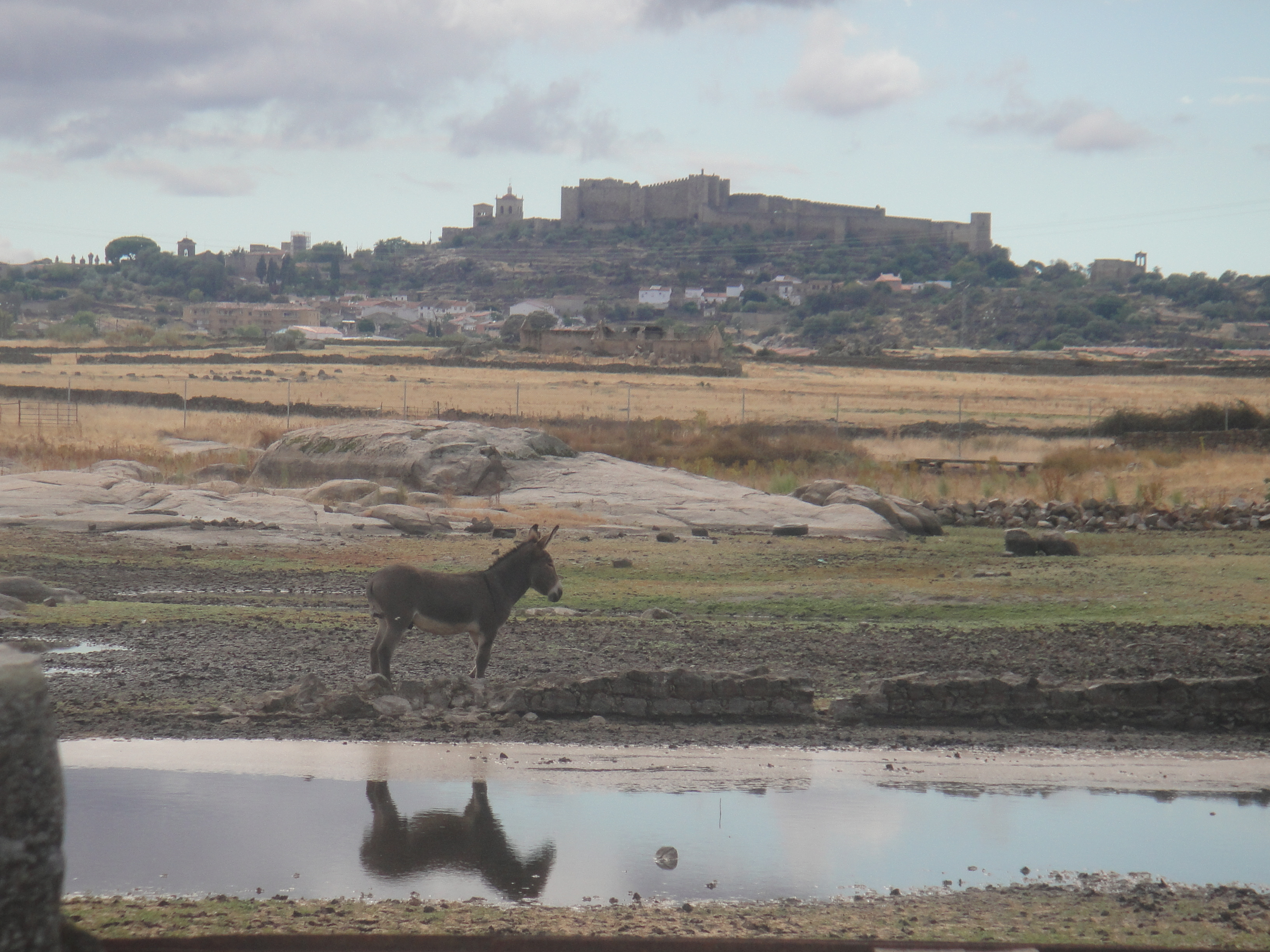 Vista de Trujillo y su castillo, provincia de Cáceres, (España).